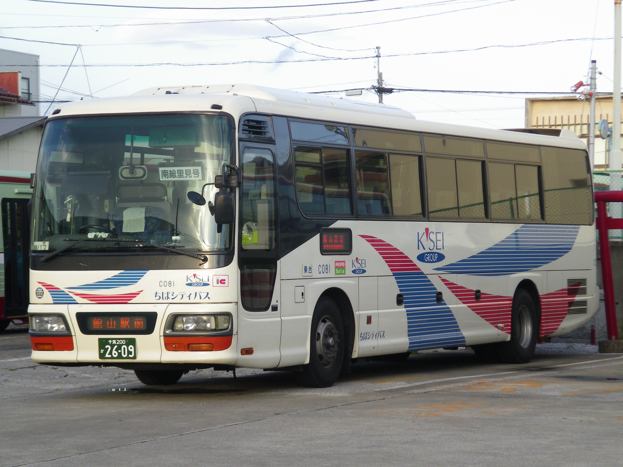 いすゞ・ガーラ 千葉200か2609 館山日東バス本社営業所敷地外から撮影